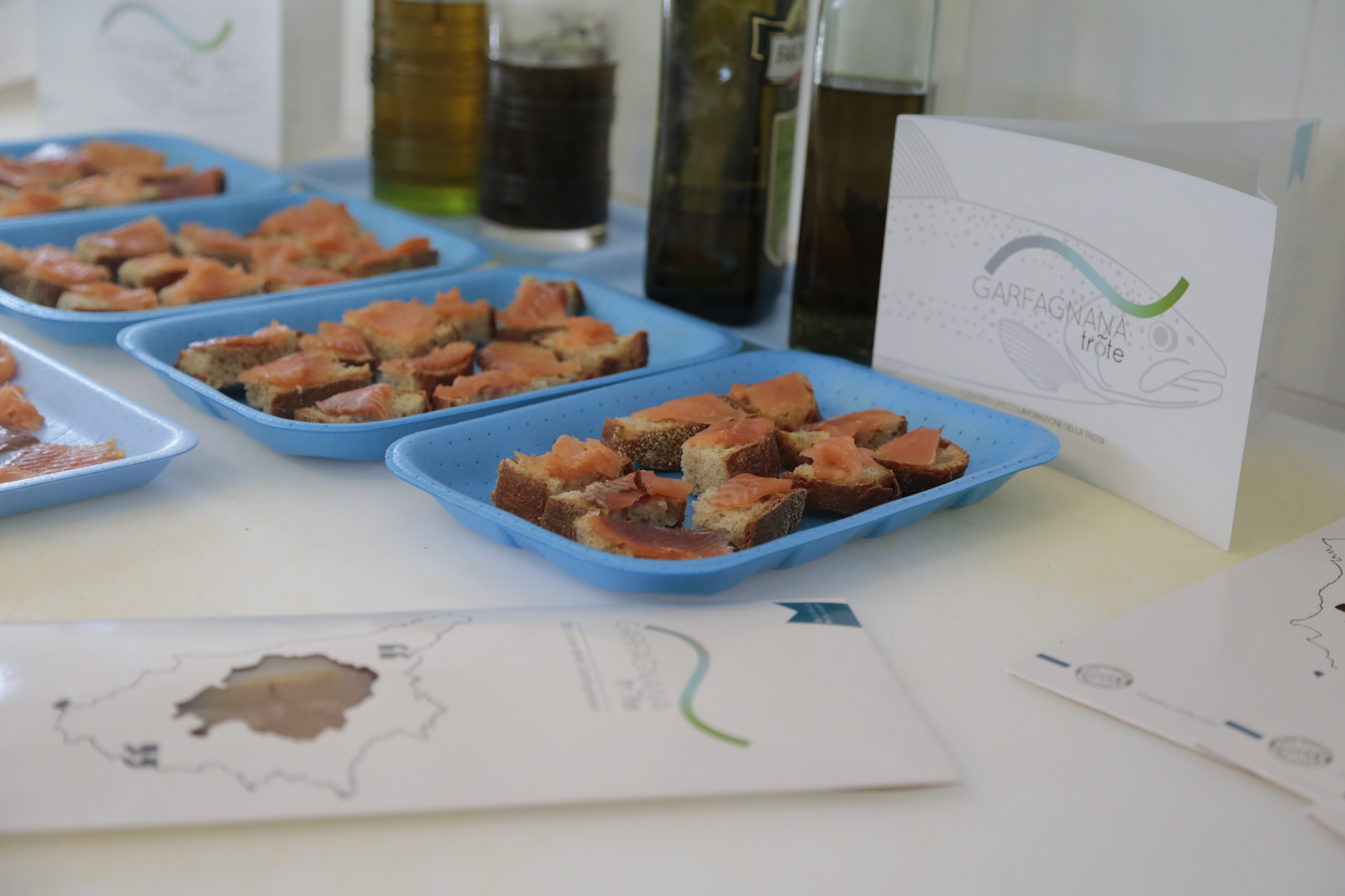 GarfagnanaTrote